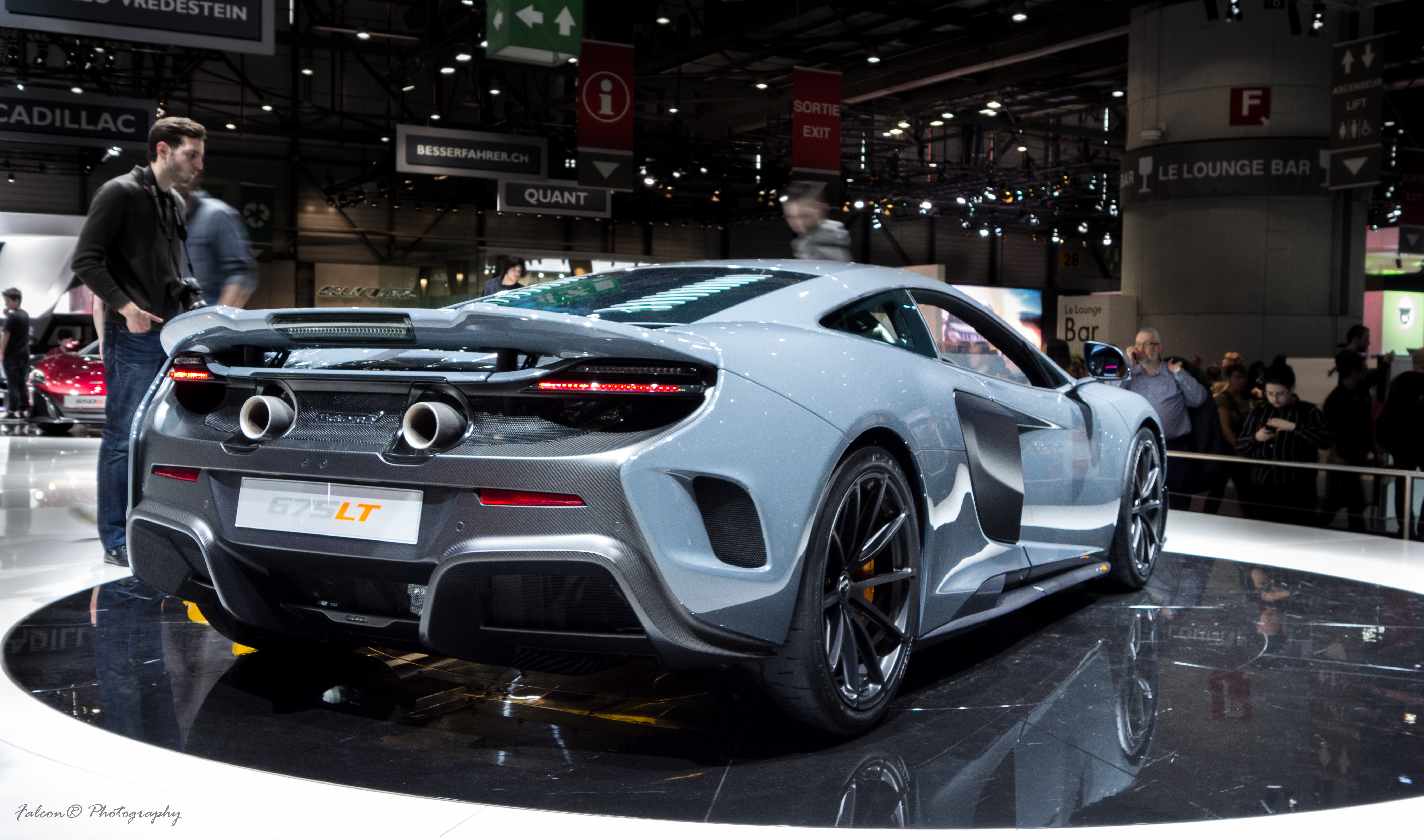 M838TL : 675 ch à 7 100 tours/minute 700Nm à 5 500-6 500 tours/minute 7 rapports 1 230 kg ; 42,5% / 57,5% Longueur (mm):4 546 Largeur (mm):2 095 Hauteur (mm):1 188 0-100 en 2,9sec 330km/h max 356 772 €